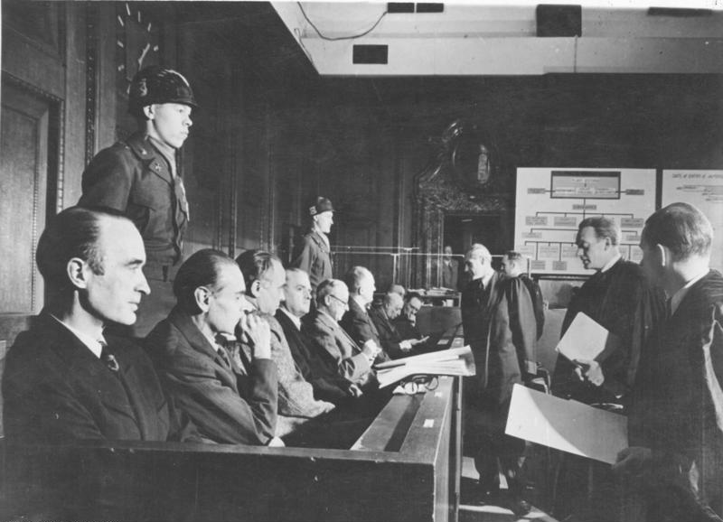 Nürnberg, Krupp-Prozess, Angeklagte Zentralbild/22.12.1947 Zwiegespräch der Angeklagten mit ihren Verteidigern Unser Bild zeigt einen Ausschnitt aus dem Krupp Prozess, der am 8.12.1947 in Nürnberg begann. Während einer Verhandlungspause haben die Angeklagten Gelegenheit, mit ihren Verteidigern wichtige Fragen ihrer Verteidigung zu besprechen. In der Anklagebank v.l.n.r.: der Hauptangeklagte Alfried Krupp von Bohlen und Halbach, Ewald Löser, Eduard Houdremont, Erich Müller, Friedrich Janssen, Karl Pfirsisch [Karl Pfirsch] und Karl Eberhardt. Mit der Hand am Kinn Heinrich Korschan. Abgebildete Personen: Krupp von Bohlen und Halbach, Alfried: Alleininhaber des Krupp-Konzerns, Bundesrepublik Deutschland Müller, Erich Prof. Dr. Ing.: Leiter der Rüstungskonstruktionen der Friedrich Krupp AG, Deutschland